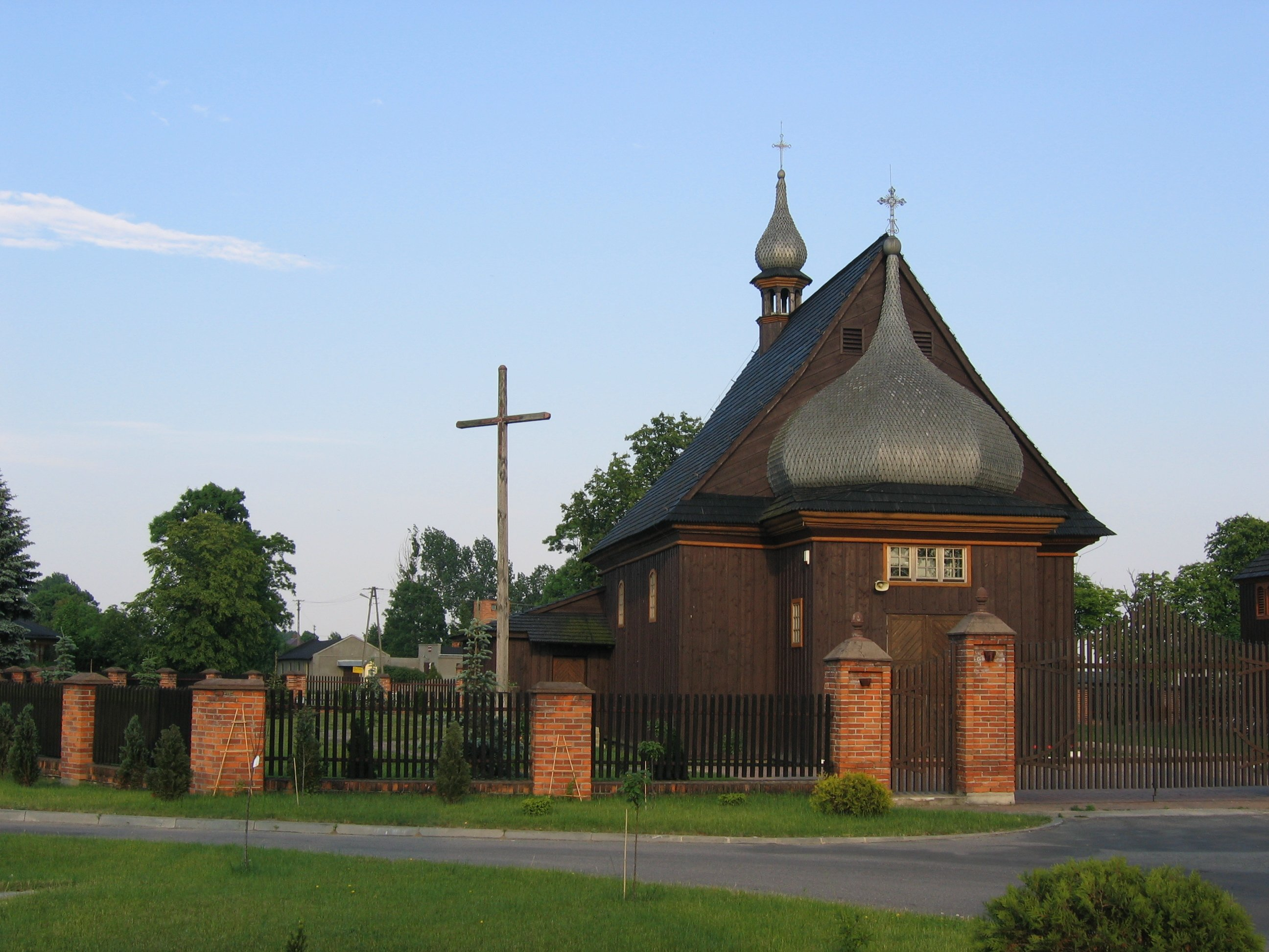 Plecka Dąbrowa - kościół par. p.w. Zwiastowania NMP